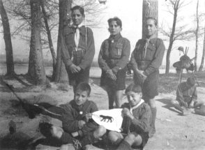 Patrulla del tigre. Zaragoza (1930) Procedente del archivo histórico de Scouts de Aragón. Se cuenta con la autorización de la asociación para su publicación. Utilizada en la exposición del 90 aniversario del escultismo y guidismo en Aragón, celebrada en el Edificio Pignatelli del Gobierno de Aragón (octubre, 2003). Autor: anónimo